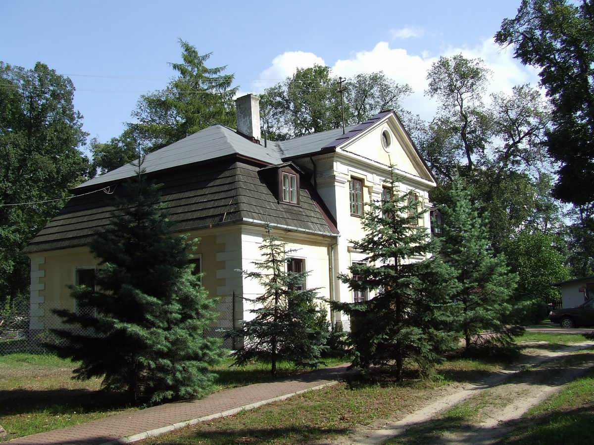 Dwór Jakubowicza - plebania, Lipków gmina Stare Babice